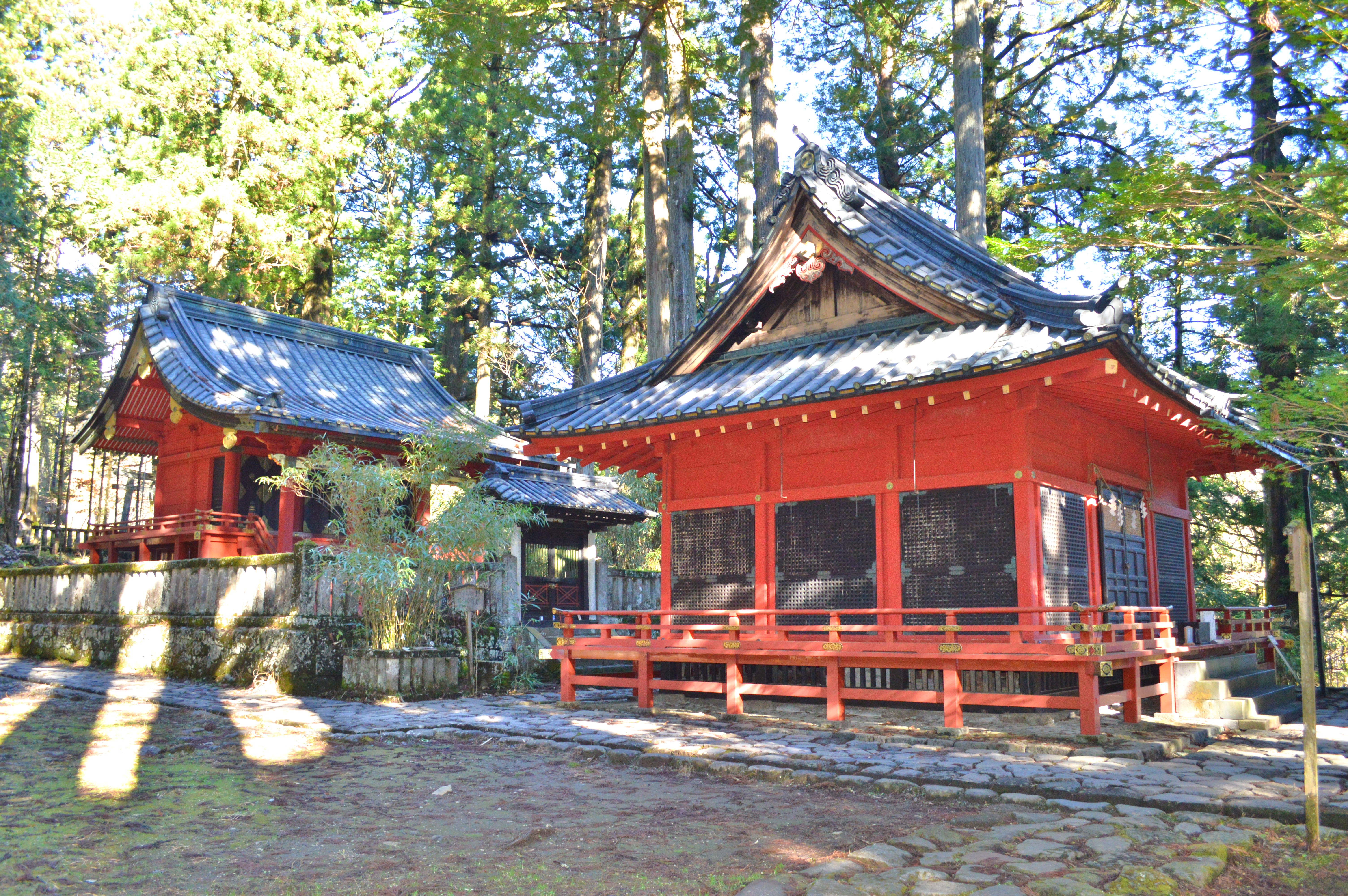 日光二荒山神社 別宮滝尾神社 社殿